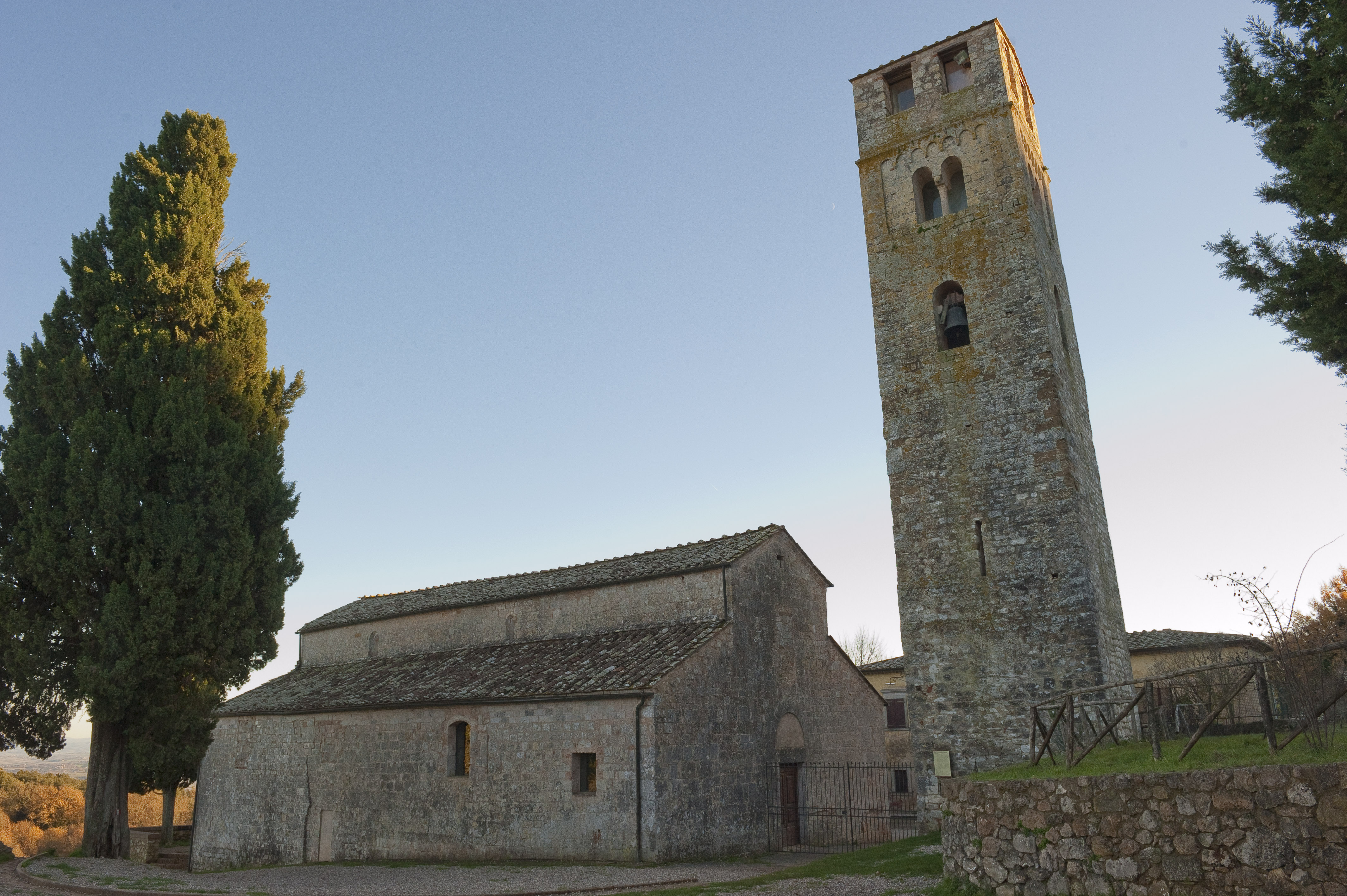 Fronte anteriore della chiesa di San Giovanni Battista a Pernina, Sovicille